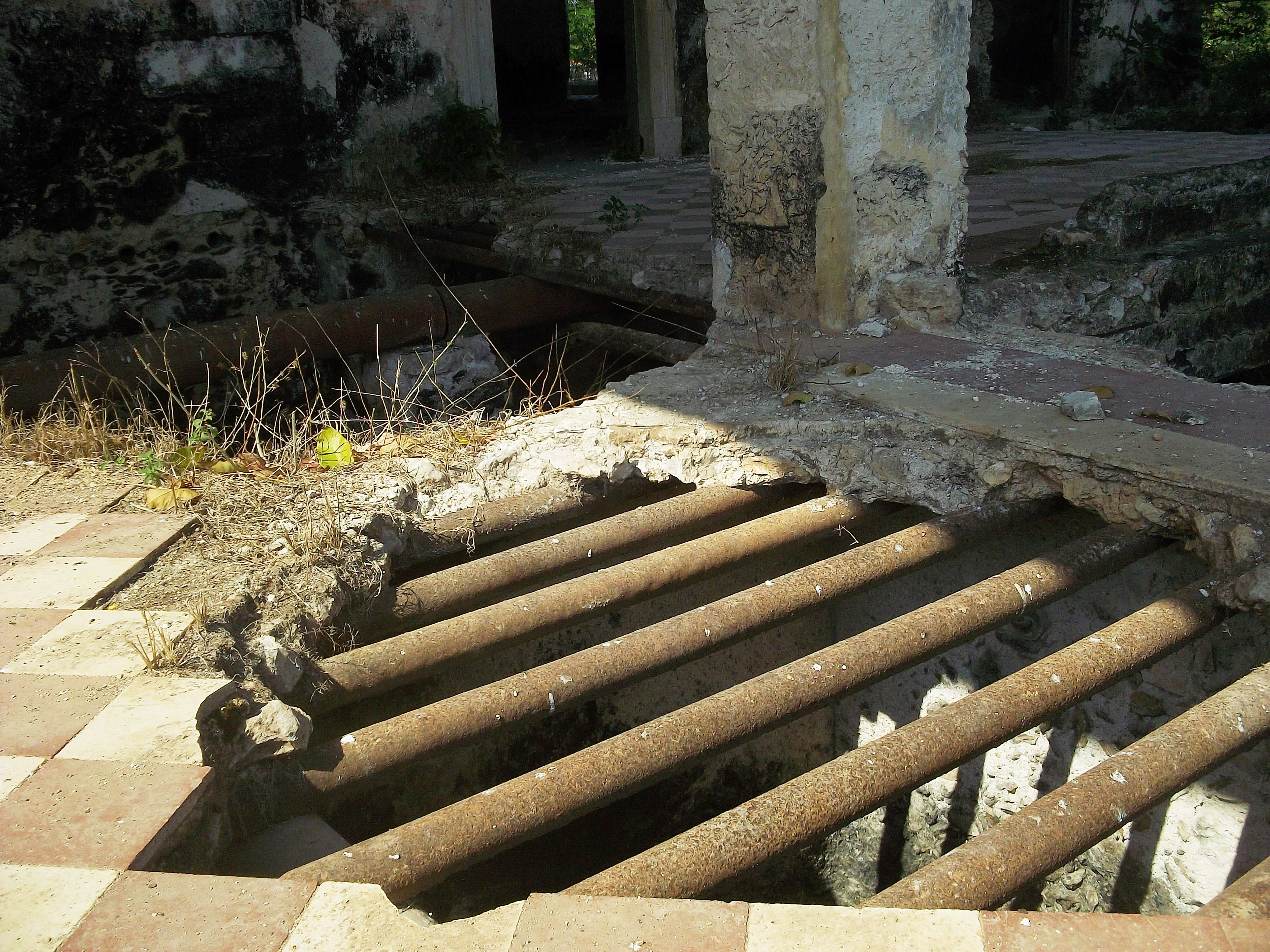 Hacienda de San Antonio Tzacalá, Yucatán.